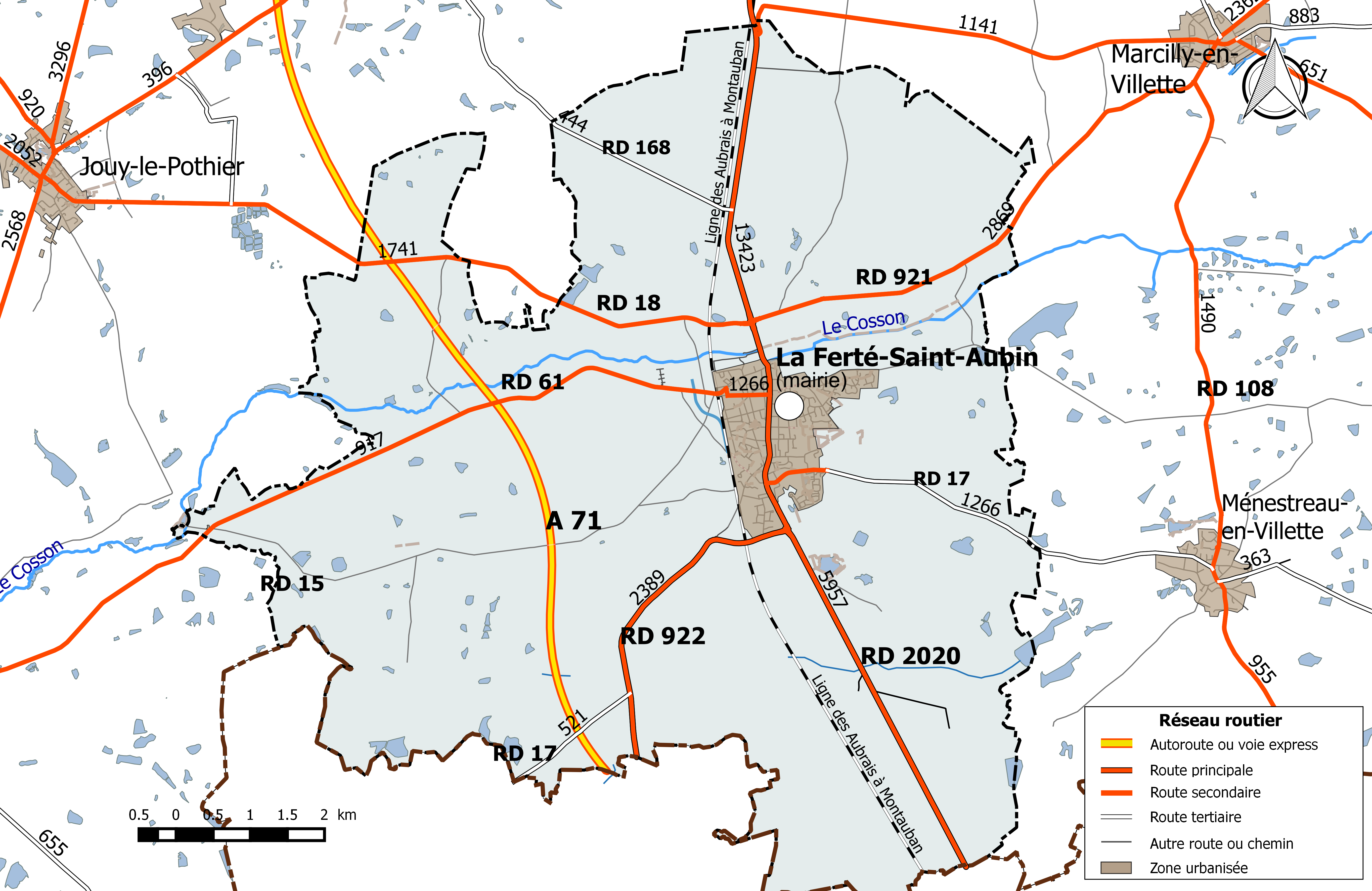 Carte du réseau routier de la commune de La Ferté-Saint-Aubin.